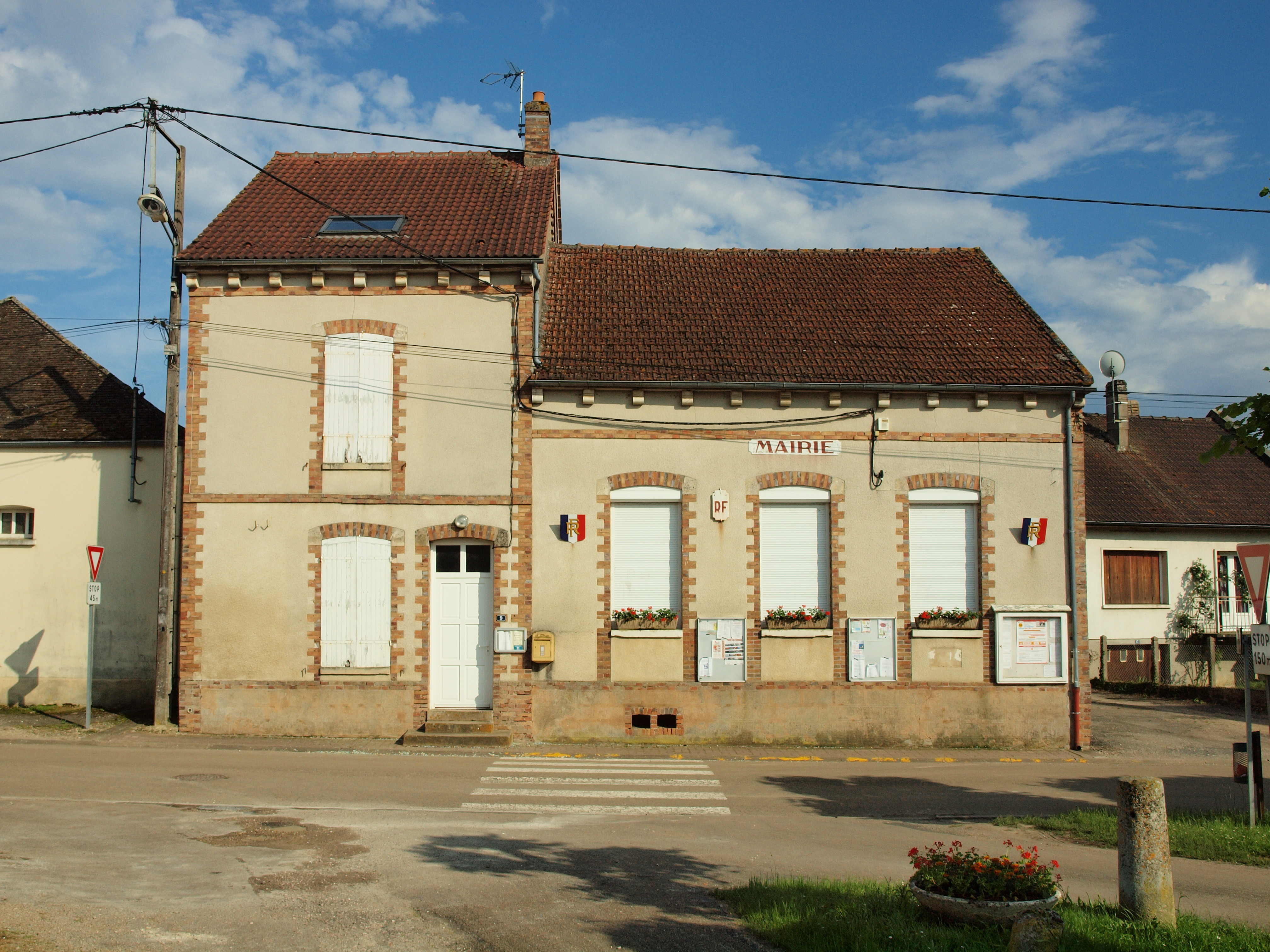 Villethierry (Yonne, France)